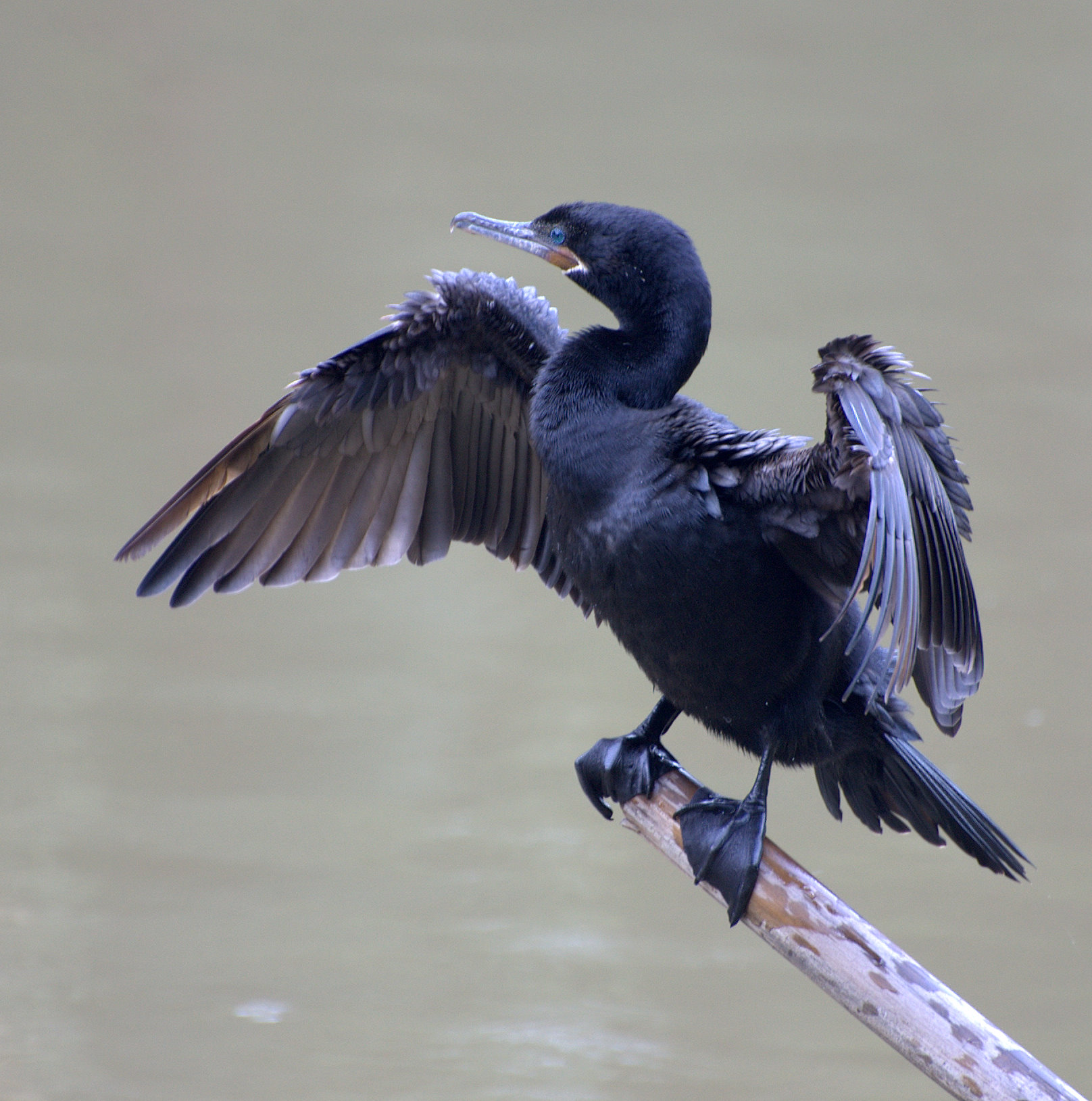 Phalacrocorax brasilianus, Horto Florestal em São Paulo